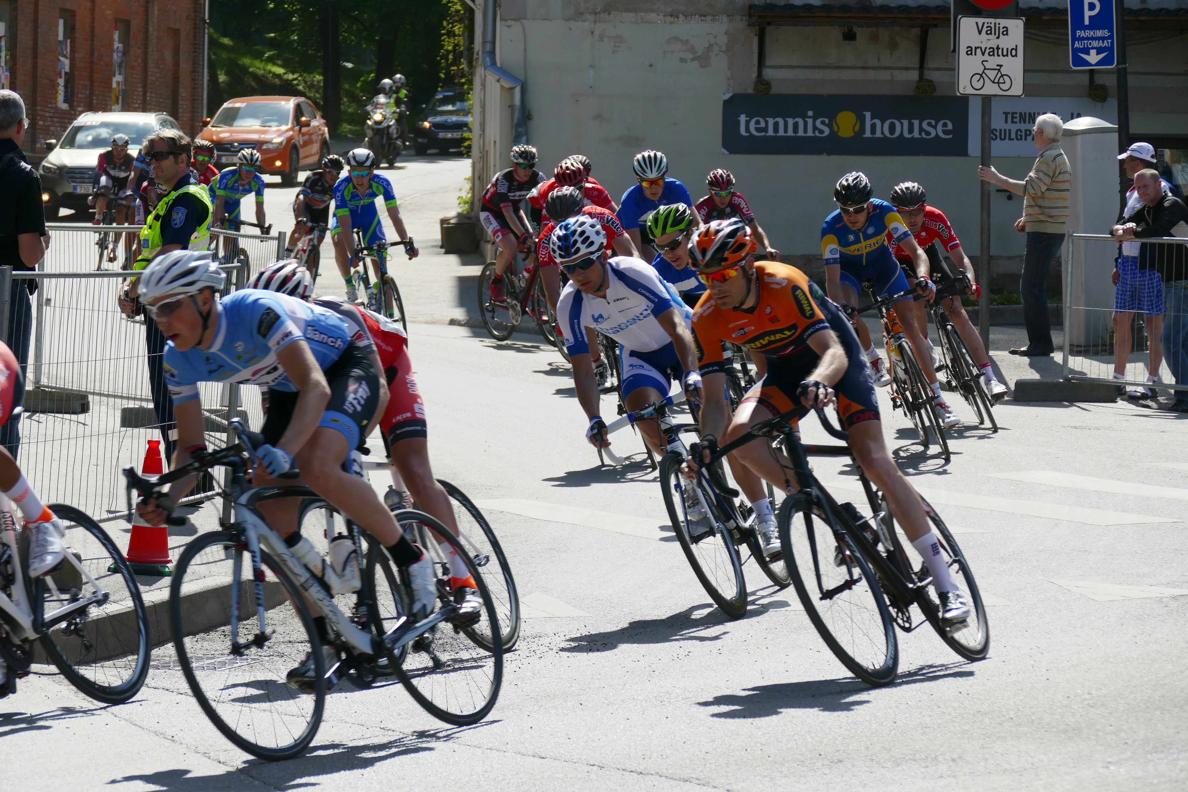 Tour of Estonia Tartu Grand Prix 2. etapp Tartu tänavatel 30.05.2015. Grupisõit 150km.